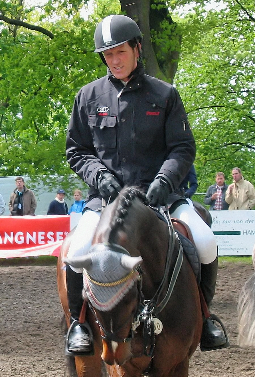 Original Reworked version of Image:LudgerBeerbaumEnorm.JPG by --Aeggy (talk) Original-Description: (Uploaded by User:Christoph73) Beschreibung: Ludger Beerbaum auf seinem Nachwuchspferd "Enorm" Quelle: Fotografiert am 07.05.2005 in Hamburg, Klein Flottbek Fotograf: Christoph Wilhelms (Christoph73) Aufgenommen mit: Canon Digital IXUS 400 (Hier ein Ausschnitt des Originalbildes) Copyright Status: GNU Freie Dokumentationslizenz